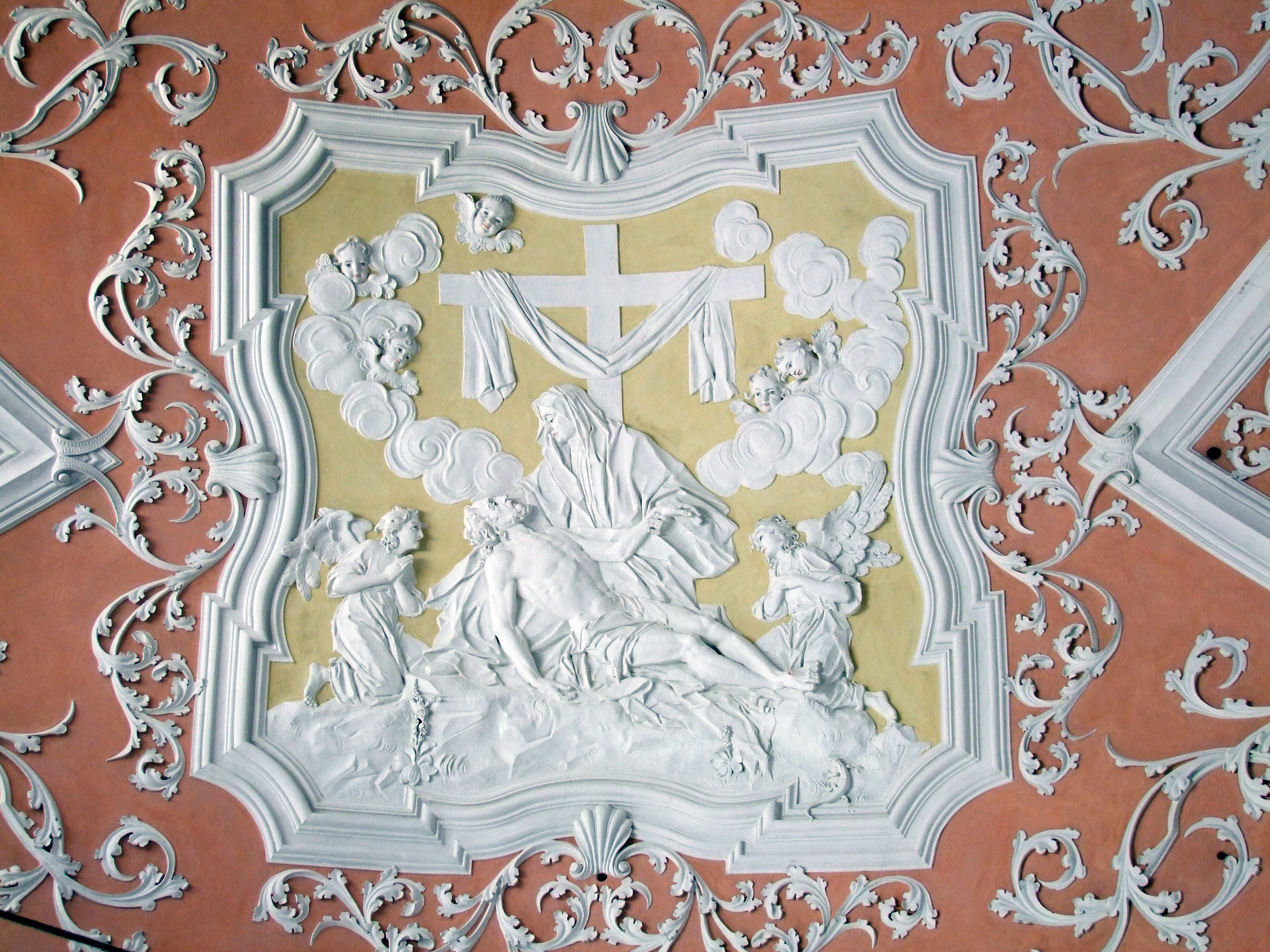 Mariä Verkündigung im oberschwäbischen Mindelheim. Ehemalige Augustiner, dann Jesuitenklosterkirche.